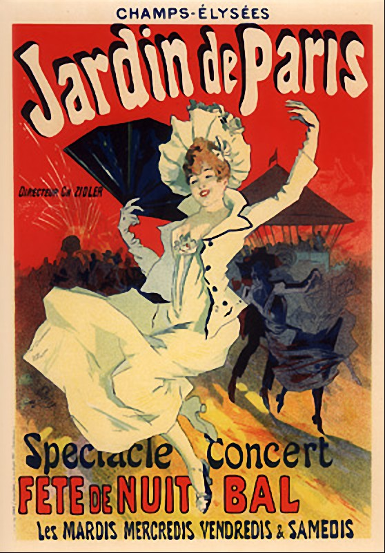 Plakat "Jardin de Paris, Fete de nuit"